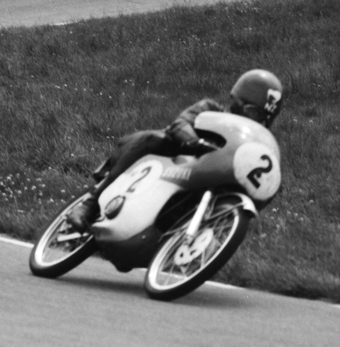 Collectie / Archief : Fotocollectie Anefo Reportage / Serie : TT Assen 1963 Beschrijving : TT te Assen. De 50cc klasse. Nummer 2 Hugh Anderson, 8 Alberto Pagani, 7 Hans-Georg Anscheidt, 6 Mitsuo Itoh en 1 Ernst Degner Datum : 29 juni 1963 Locatie : Assen, Drenthe Trefwoorden : motorsport, motorsport, sport Persoonsnaam : Anderson Hugh, Anscheidt Hans-Georg, Degner Ernst, Ito Mitsuo, Pagani Alberto Fotograaf : Bilsen, Joop van / Anefo Auteursrechthebbende : Nationaal Archief Materiaalsoort : Negatief (zwart/wit) Nummer archiefinventaris : bekijk toegang 2.24.01.04 Bestanddeelnummer : 915-3148